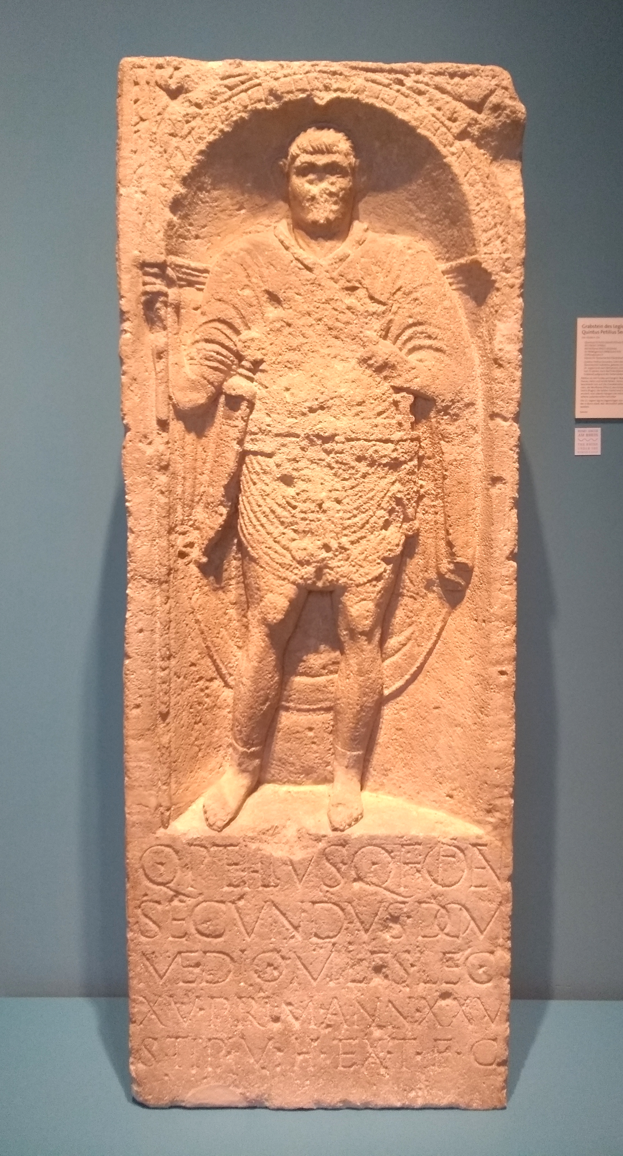 Grabstein des Quintus Petilius Secundus (CIL XIII,8079), heute im Rheinischen Landesmuseum Bonn